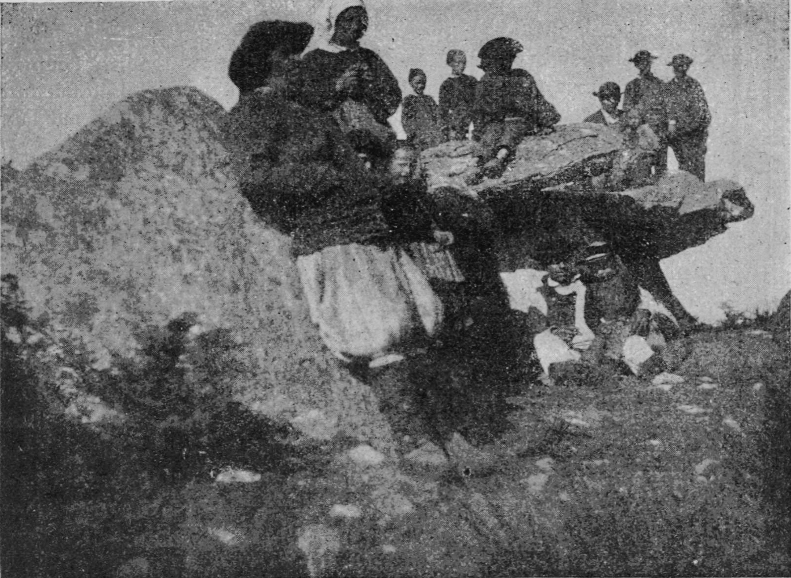 Le dolmen de Kerballanec en Beuzec-Cap-Sizun (et non à Poullan comme indiqué par l'auteur de la photo) vers 1900